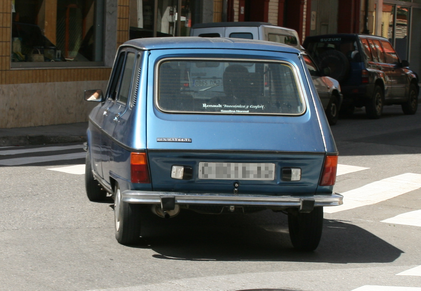 Renault 6 GTL en Villaviciosa, Asturias (España)